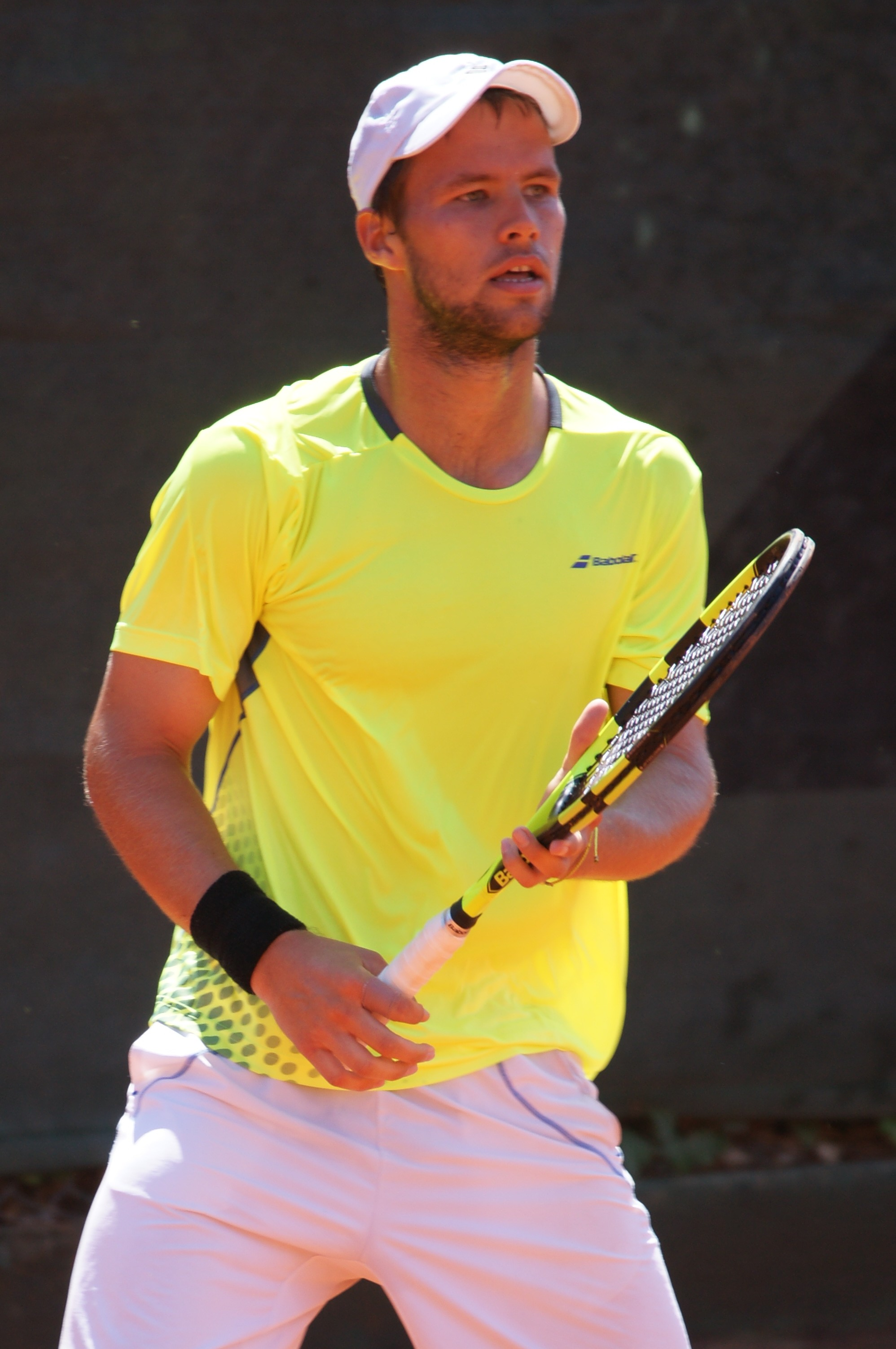 Miki Janković Nice ATP 2016